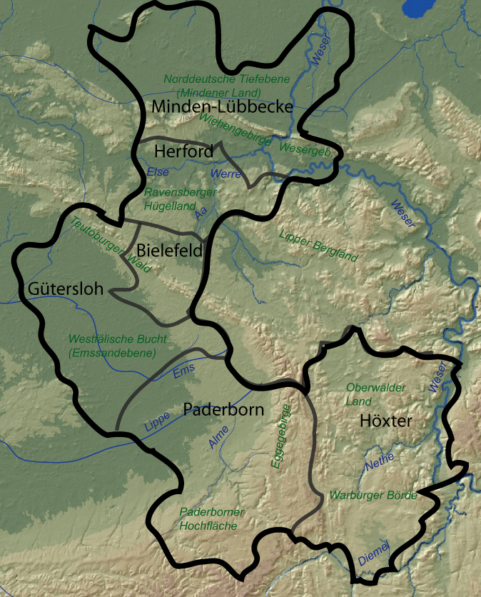 Topography of Ostwestfalen